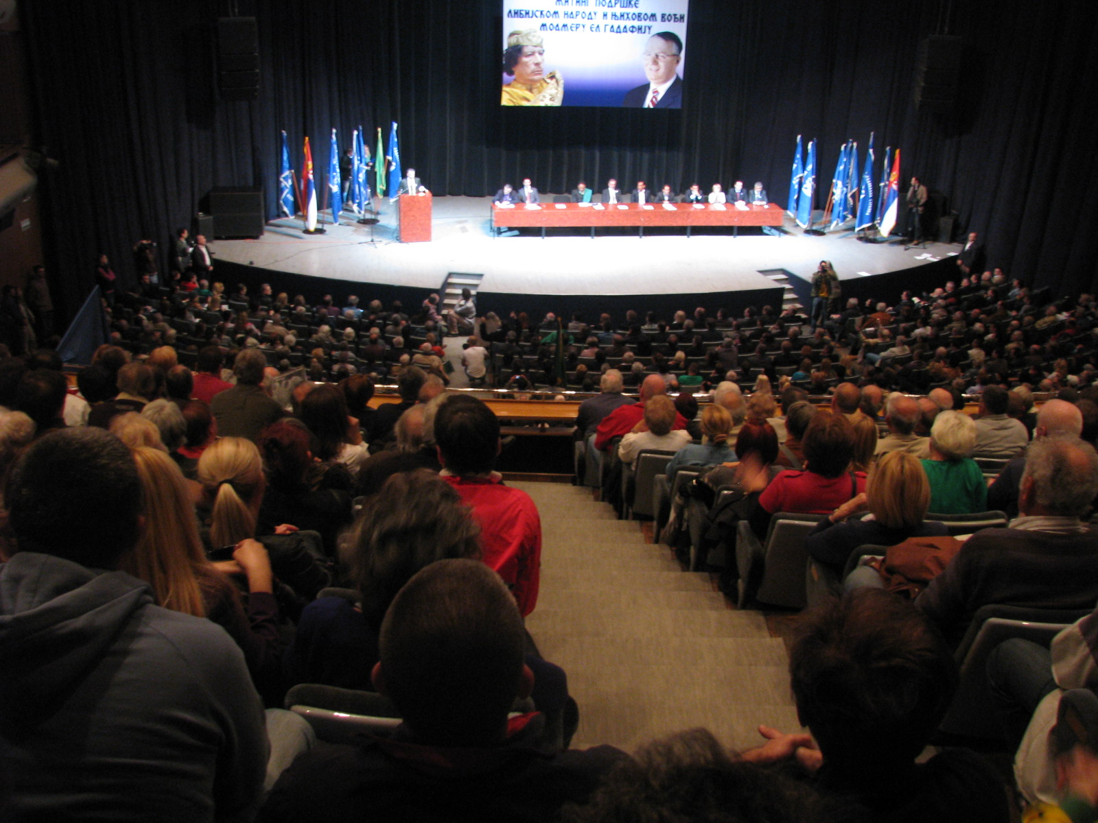 Скуп подршке Српске радикалне странке Моамеру Гадафију током рата у Либији 2011. године. Дом синдиката, Београд, 9. април 2011.